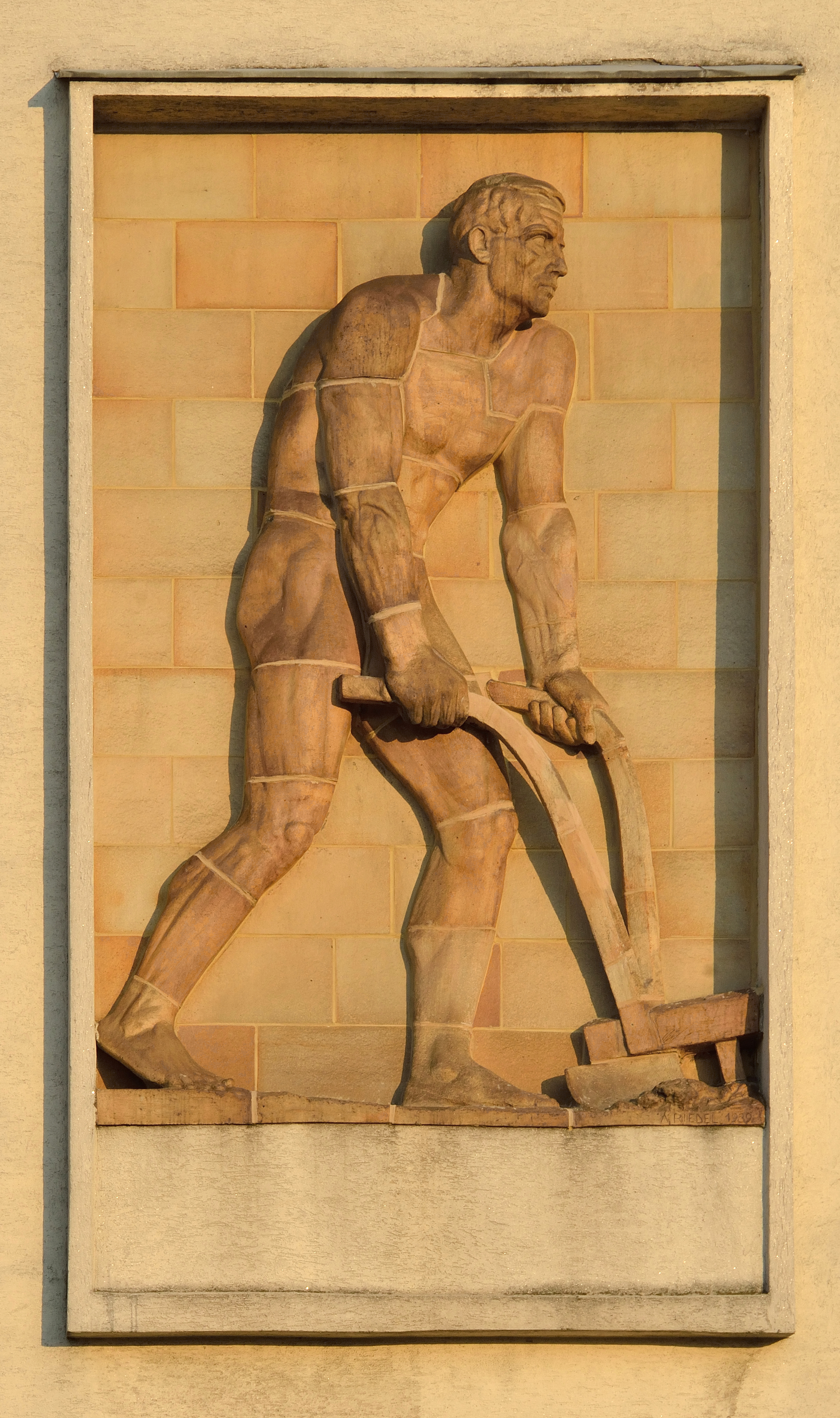 Anton-Wildgans-Hof, Fassadendetail. Von Alfons Riedel, 1939. Das ursprüngliche Hitler-Zitat wurde nach dem Krieg entfernt. [1]